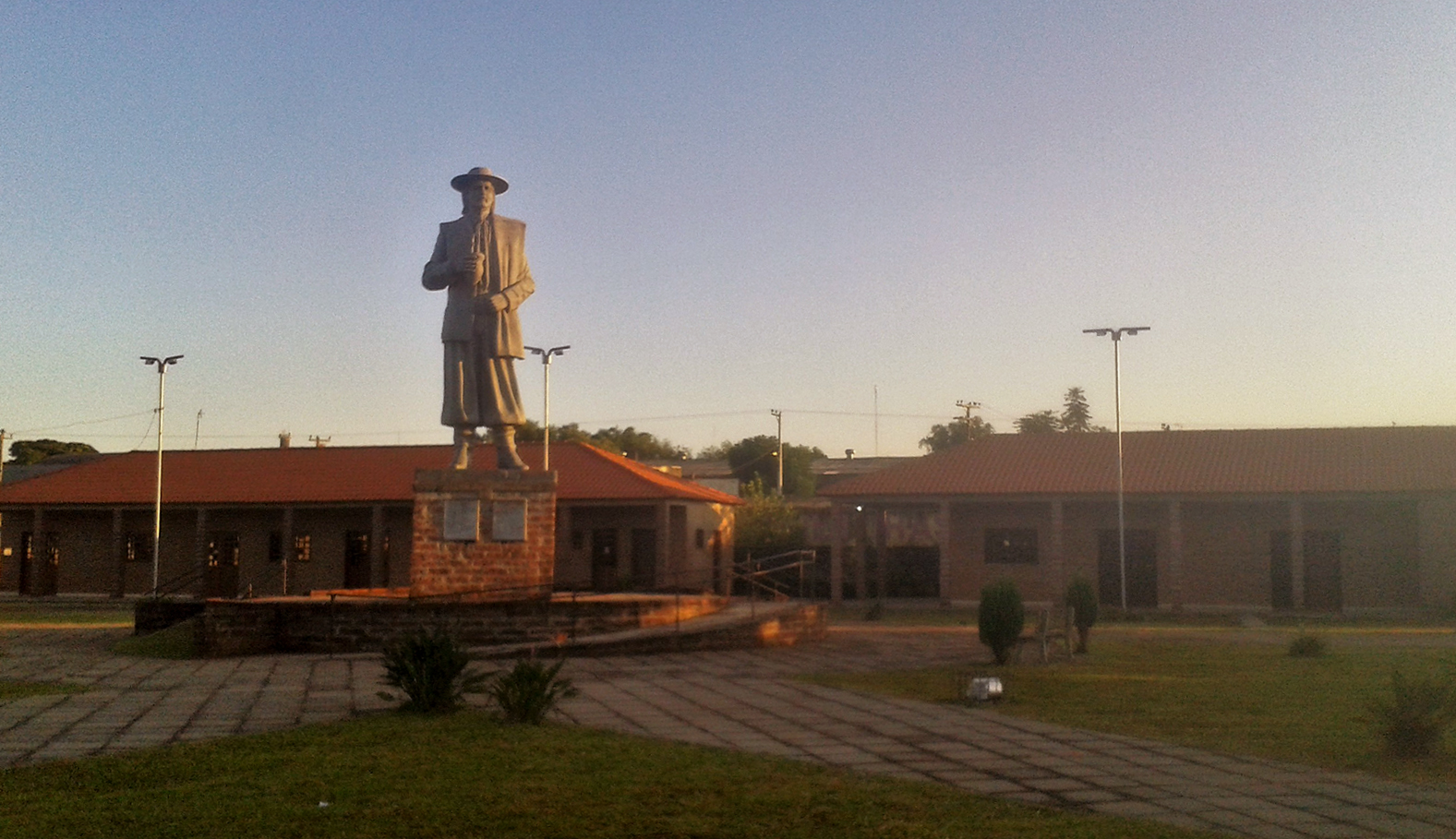 monumento e complexo turístico existente na cidade de São Luiz Gonzaga, RS, Brasil.